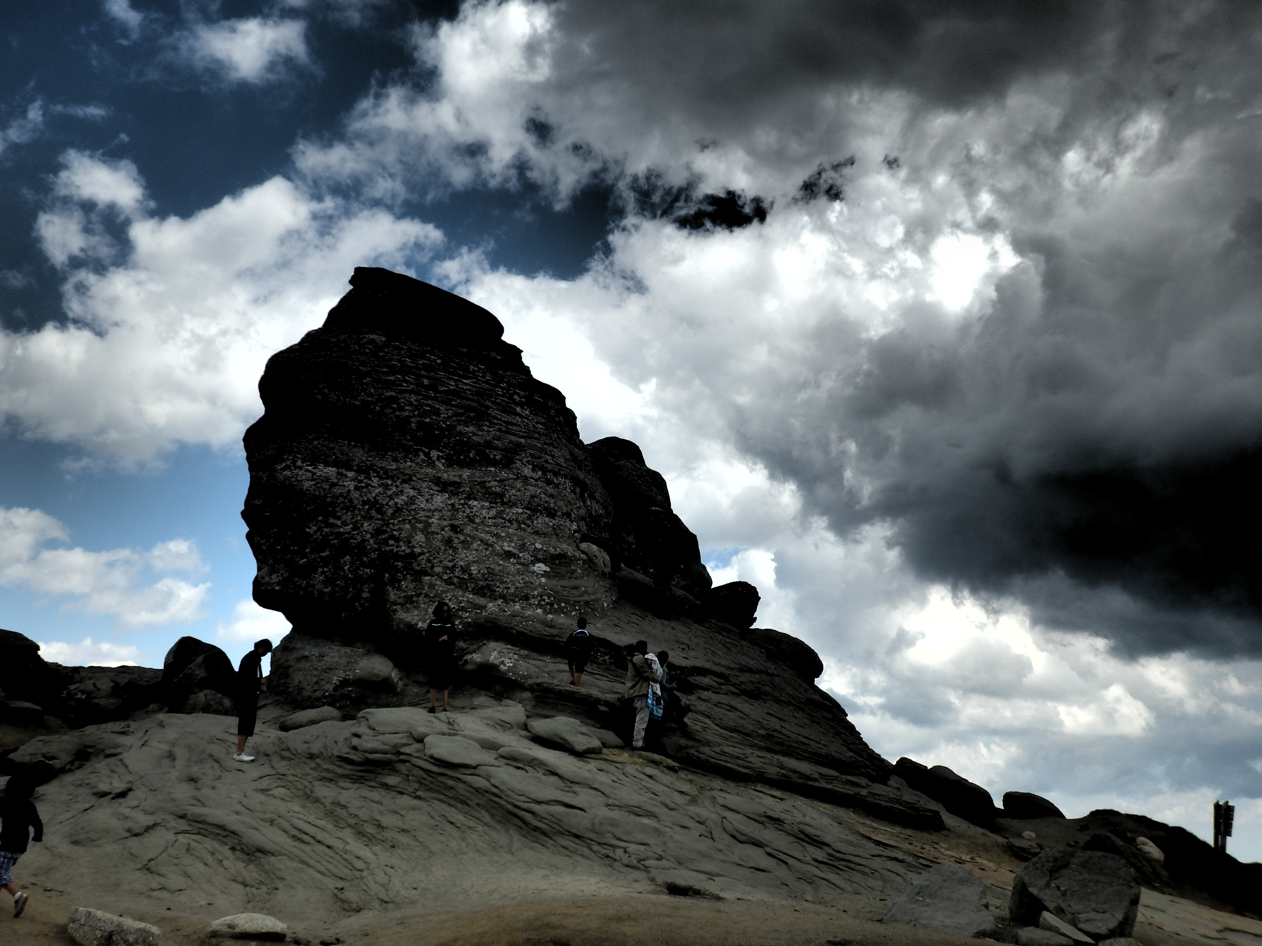 Prahova, România by Stefanjurca